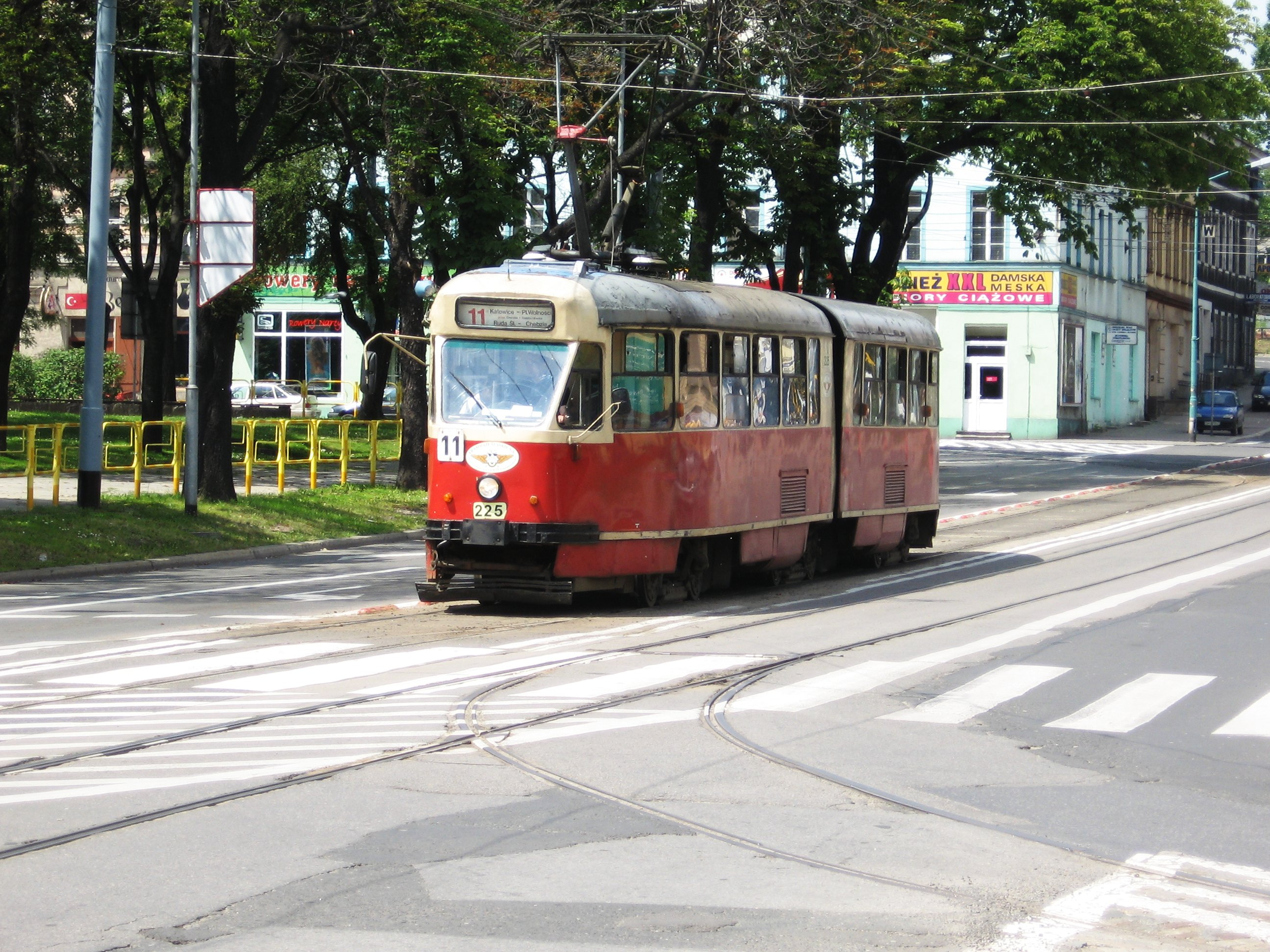 Tramwaj 11 w Chorzowie